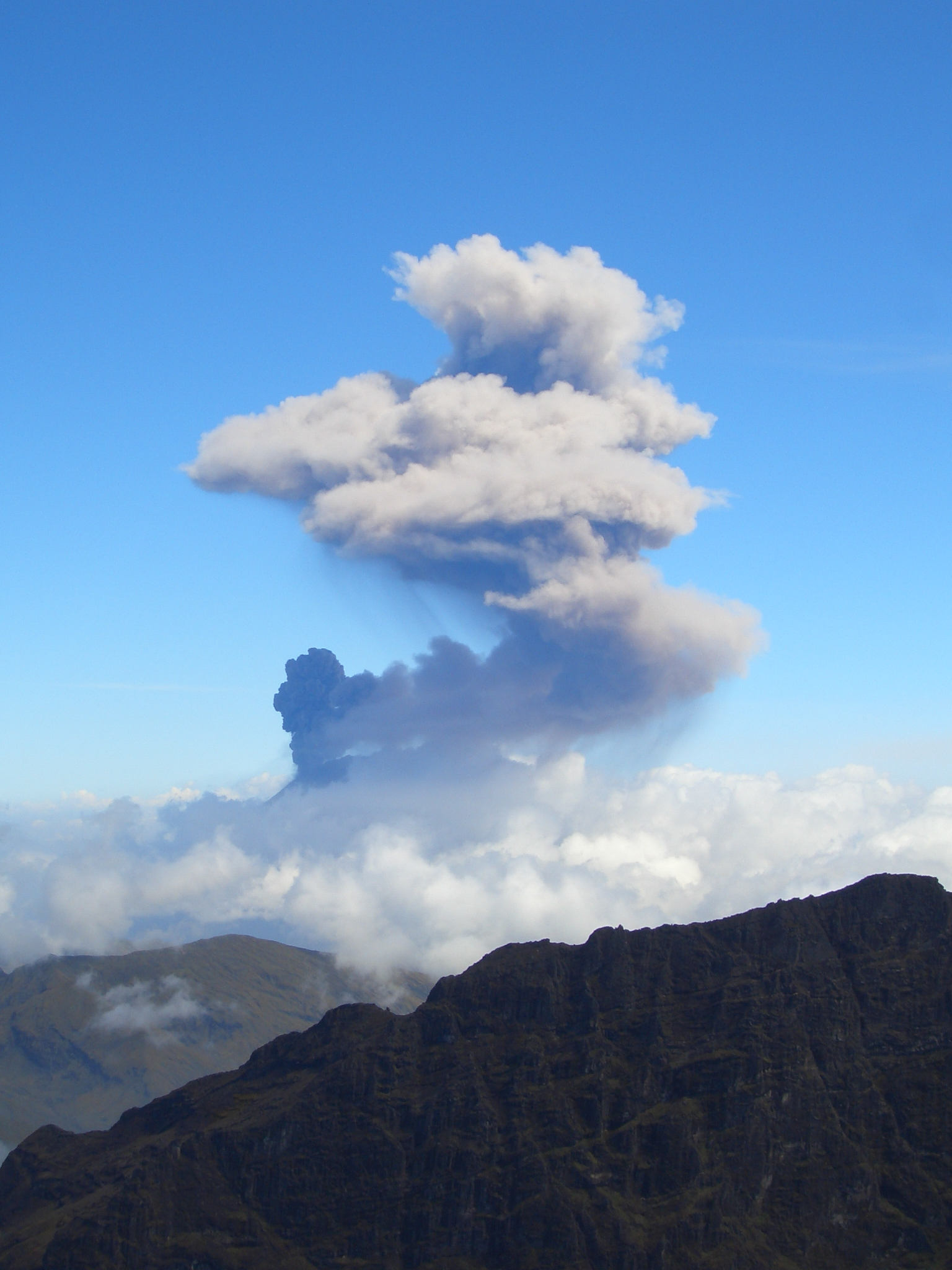 Tunguruahua, Ecuador